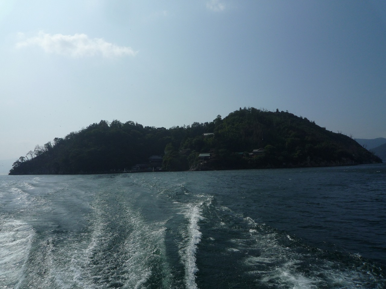 Chikubu Island（ja）